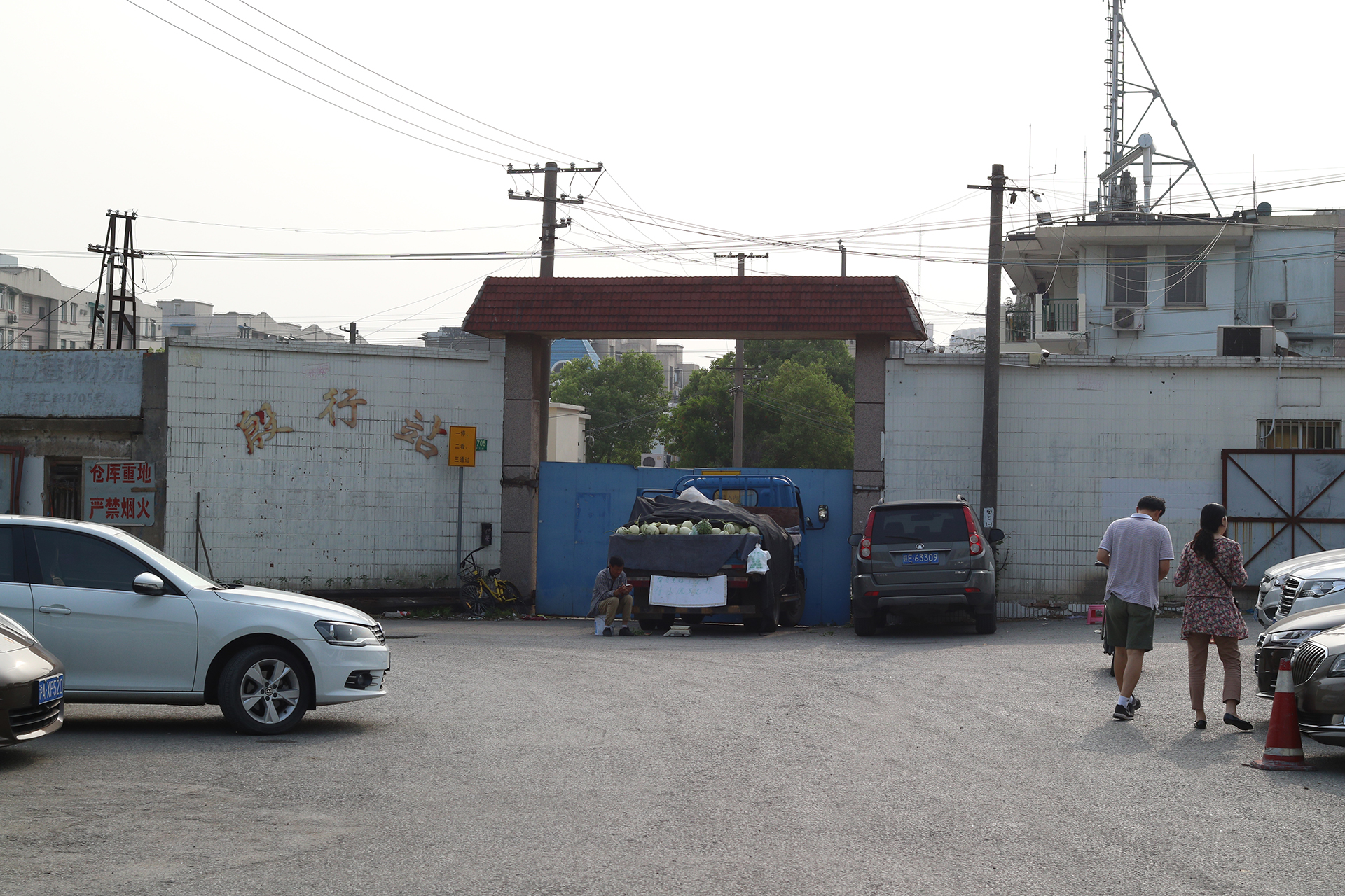 何杨支线铁路殷行站